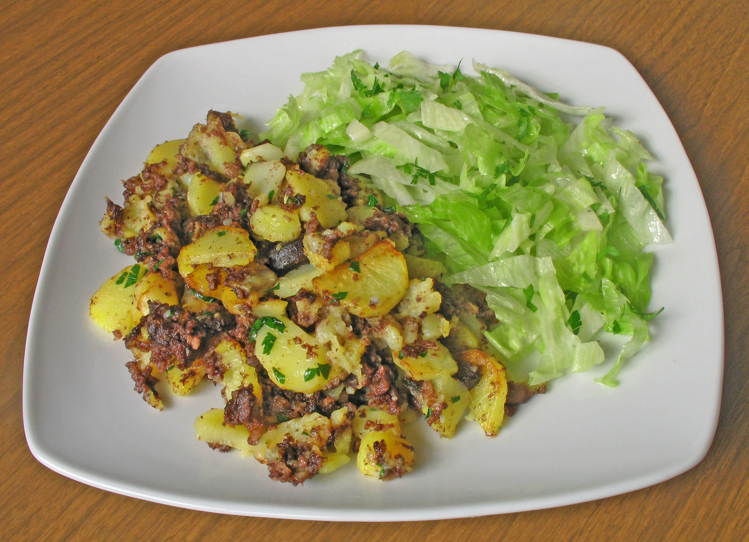 Blunzengröstl